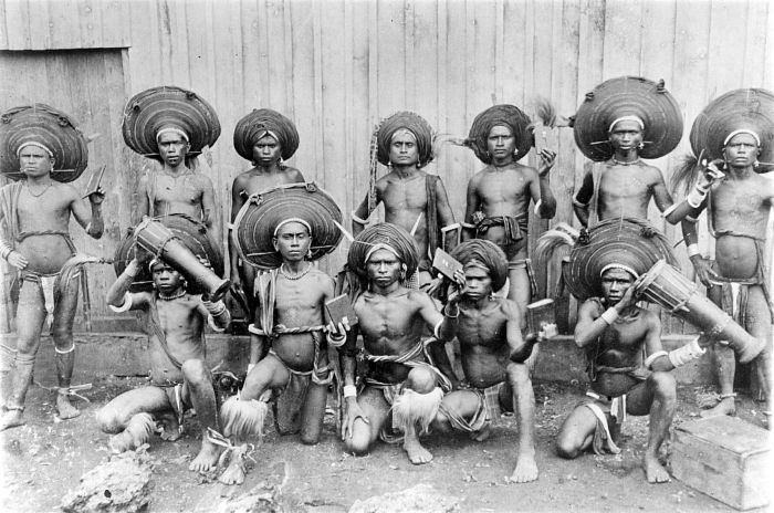 Repronegatief. Een groep jonge mannen te Adaoet op Selaroe, Tanimbar-eilanden